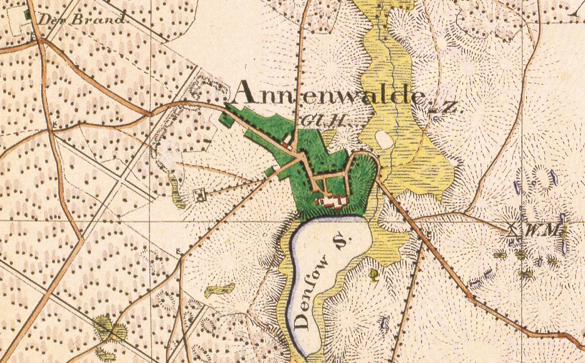 Annenwalde, Gemeindeteil von Densow, Ortsteil der Stadt Templin, Landkreis Uckermark, Brandenburg, Ausschnitt aus dem Urmesstischblatt 2846 Gandenitz von 1825